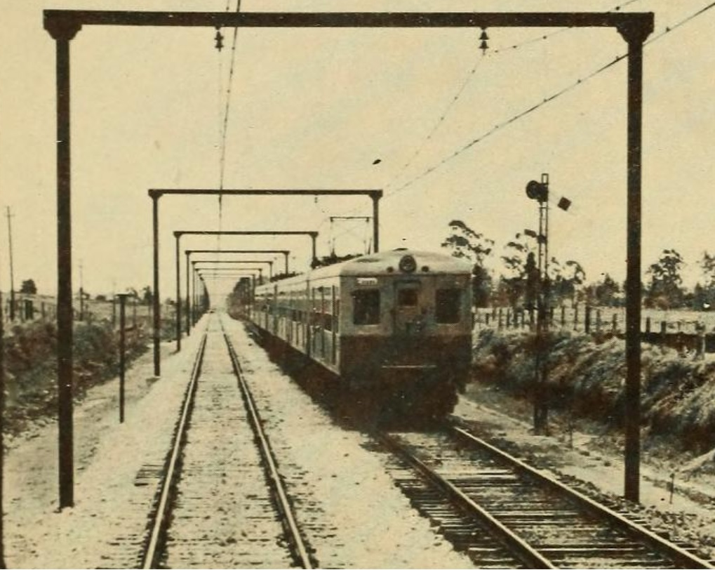 Um trem da Série 100 da Estrada de Ferro Central do Brasil, subsidiária da Rede Ferroviária Federal S.A. (RFFSA) circulando nos subúrbios recém eletrificados de São Paulo. Imagem publicada no Relatório Anual da RFFSA de 1964.